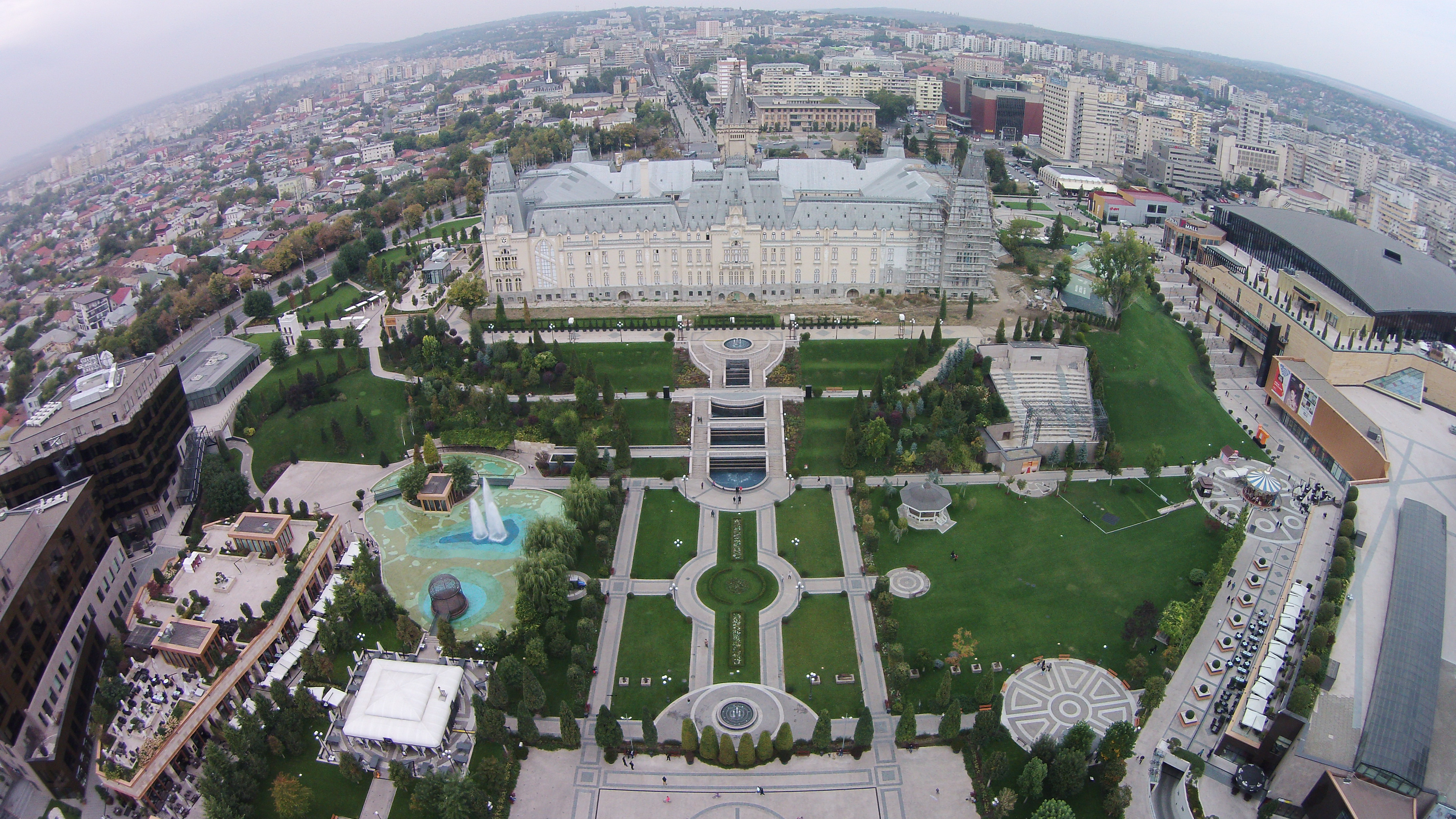 Vedere aeriana a palatului 01